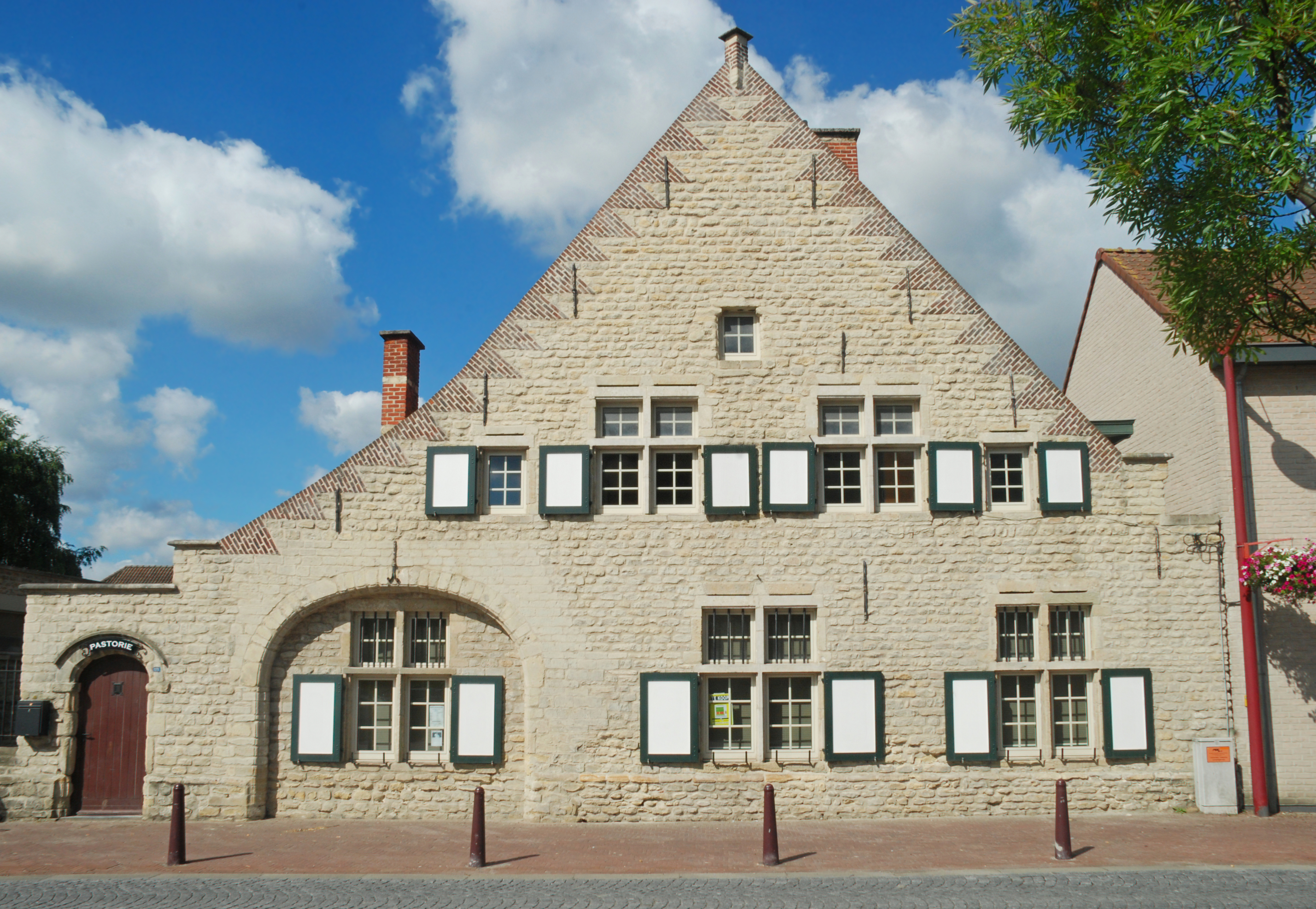 Belgique - Brabant flamand - Steenokkerzeel - Perk - Cure (pastorie)